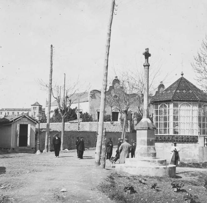 Creu a Castellterçol. Josep Salvany i Blanch (1912)